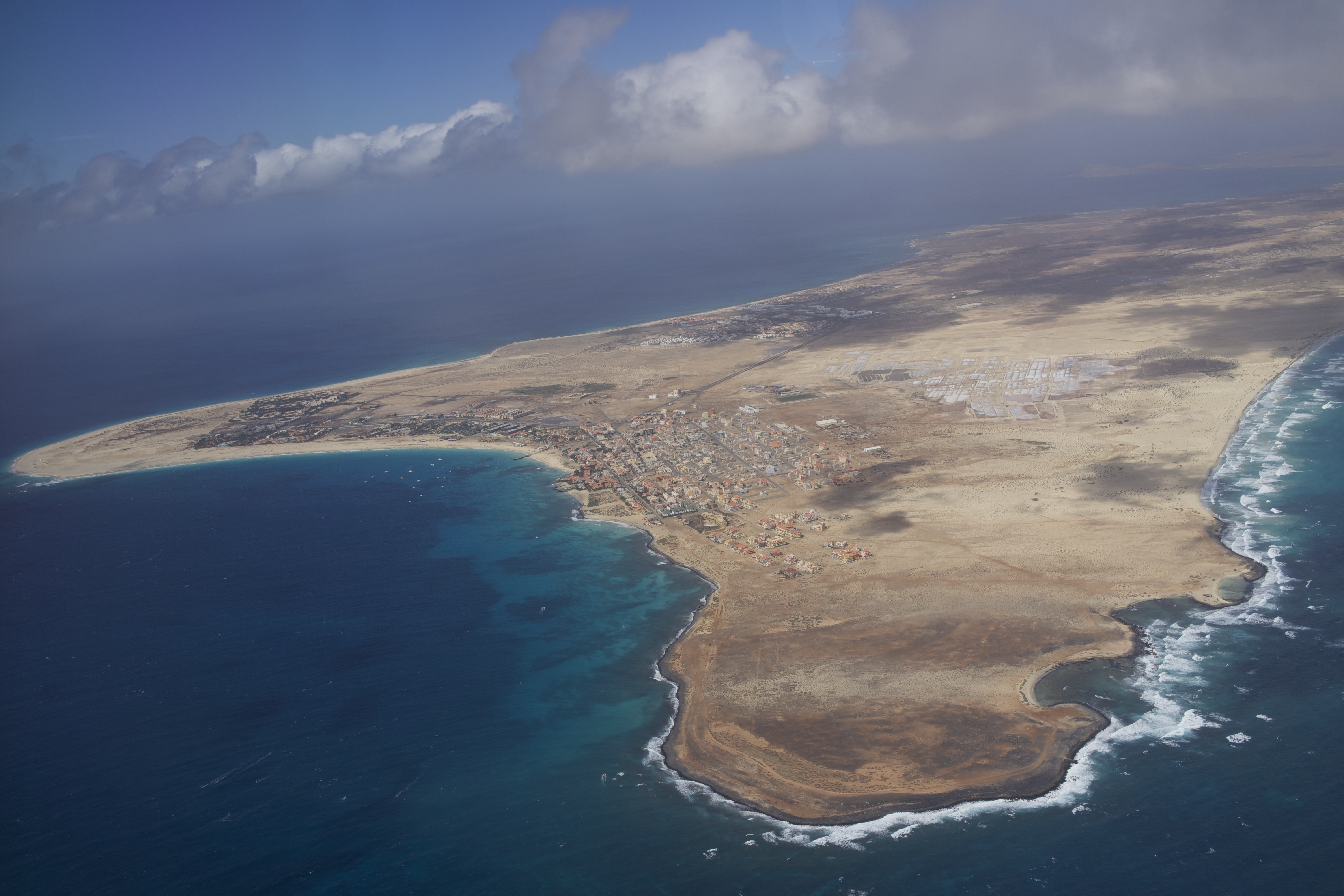 Blick auf die kapverdische Insel Sal von Süden. In der weiten Bucht in der linken unteren Bildhälfte liegt das Dorf Santa Maria.